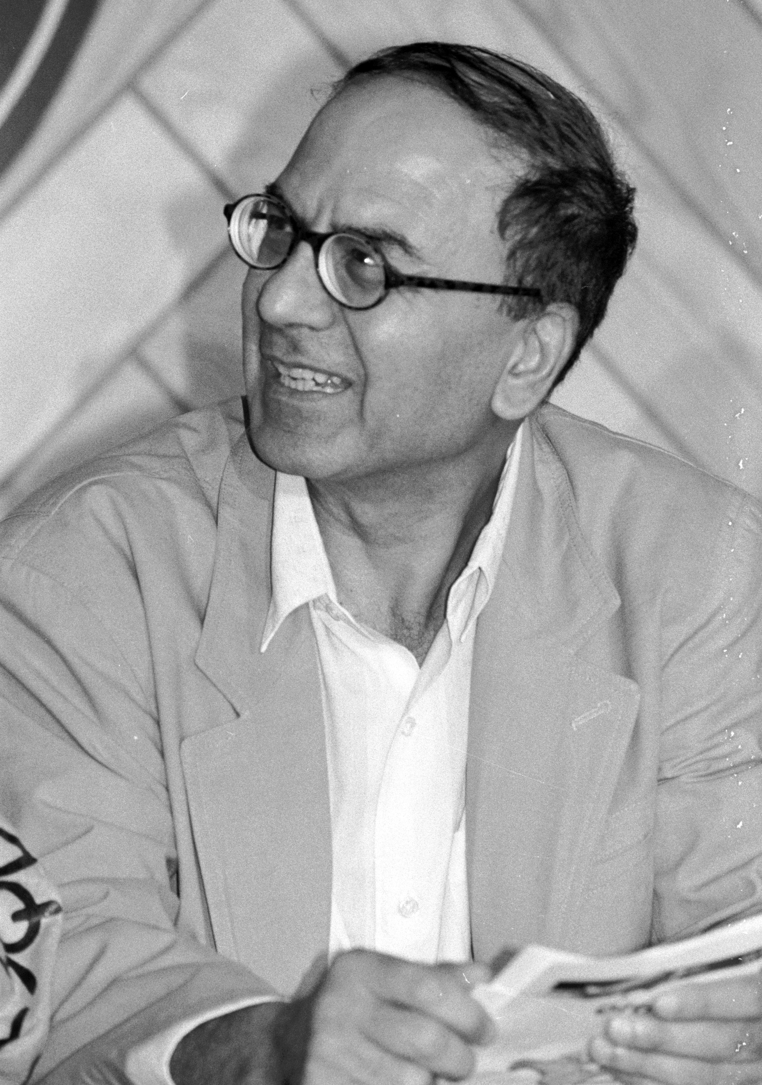 André Halimi, délégué général du Festival du cinéma américain de Deauville.